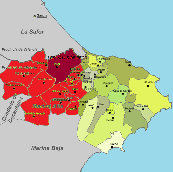 Pego i les Valls